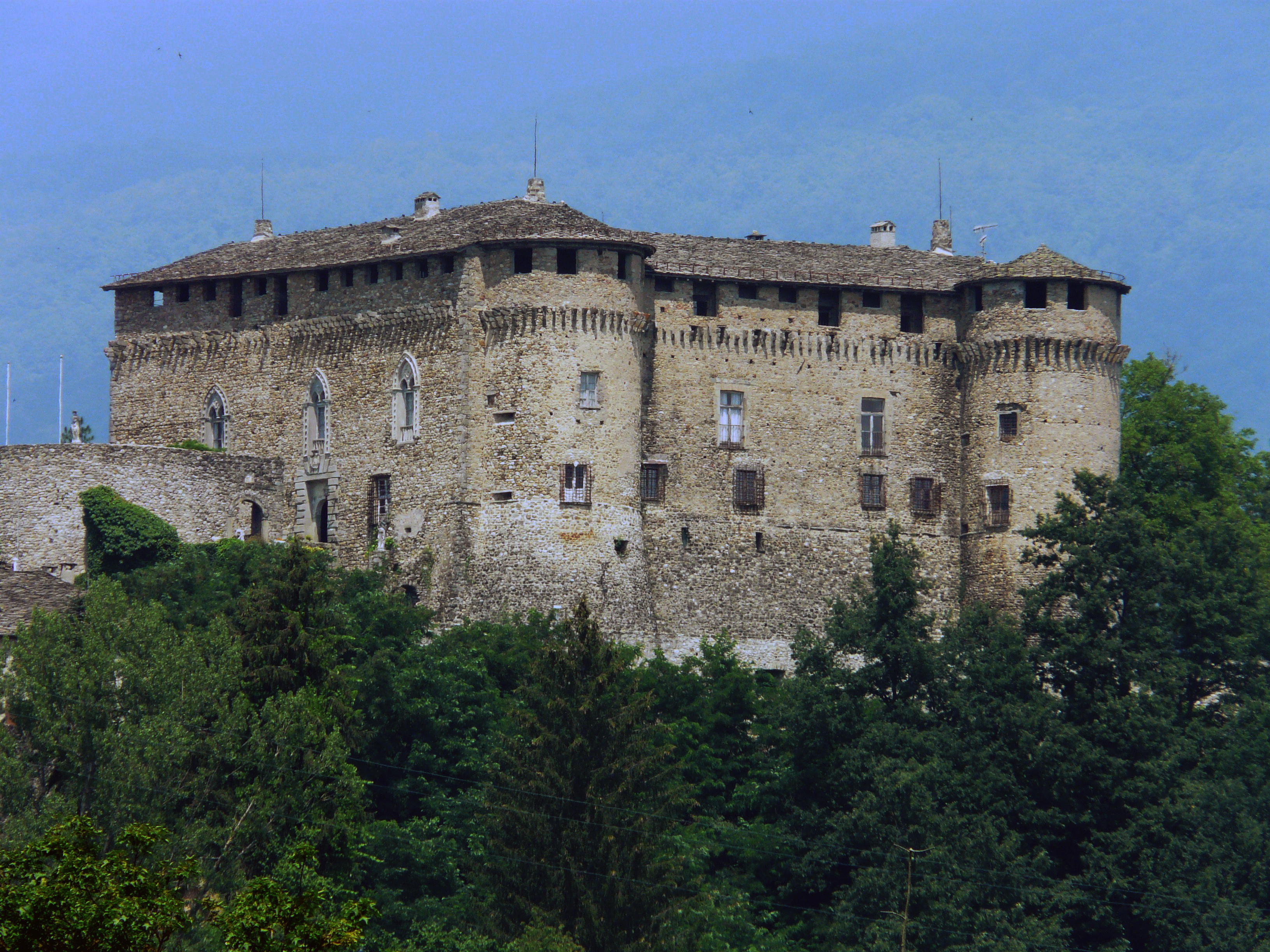 Castello di Compiano, Emilia Romagna, Italia